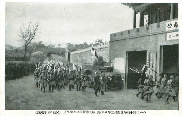 1933年，日军攻占热河省承德